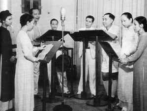 Một buổi thâu-âm của Đài Phát-thanh Pháp-Á.